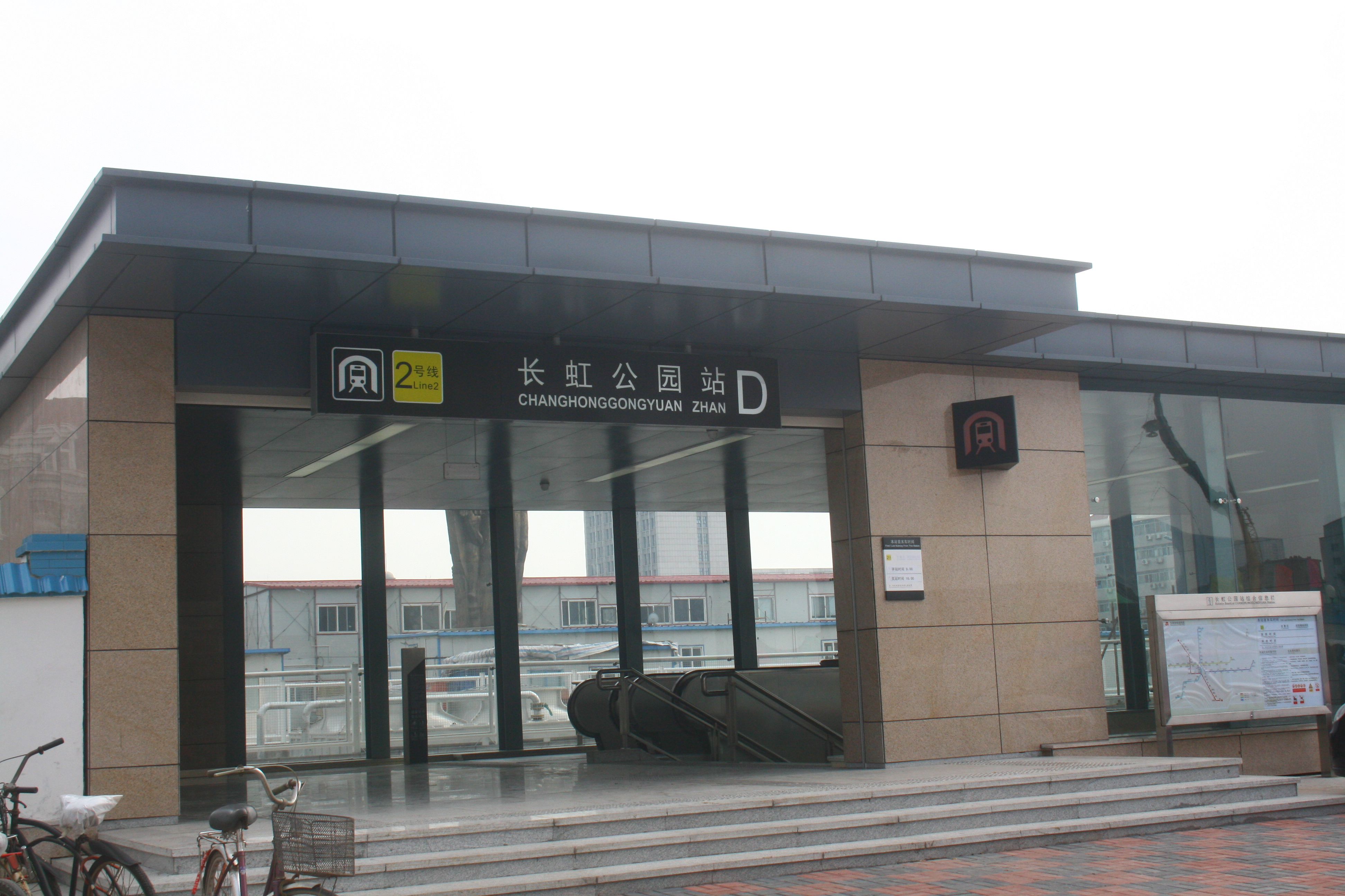 長虹公園站D出口